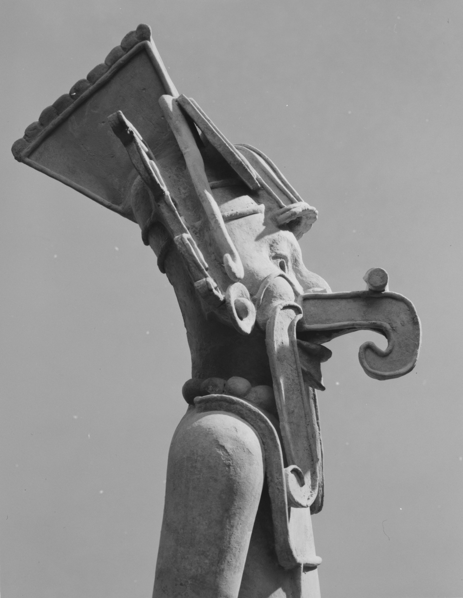 Veracruz; Figure; Ceramics-Sculpture